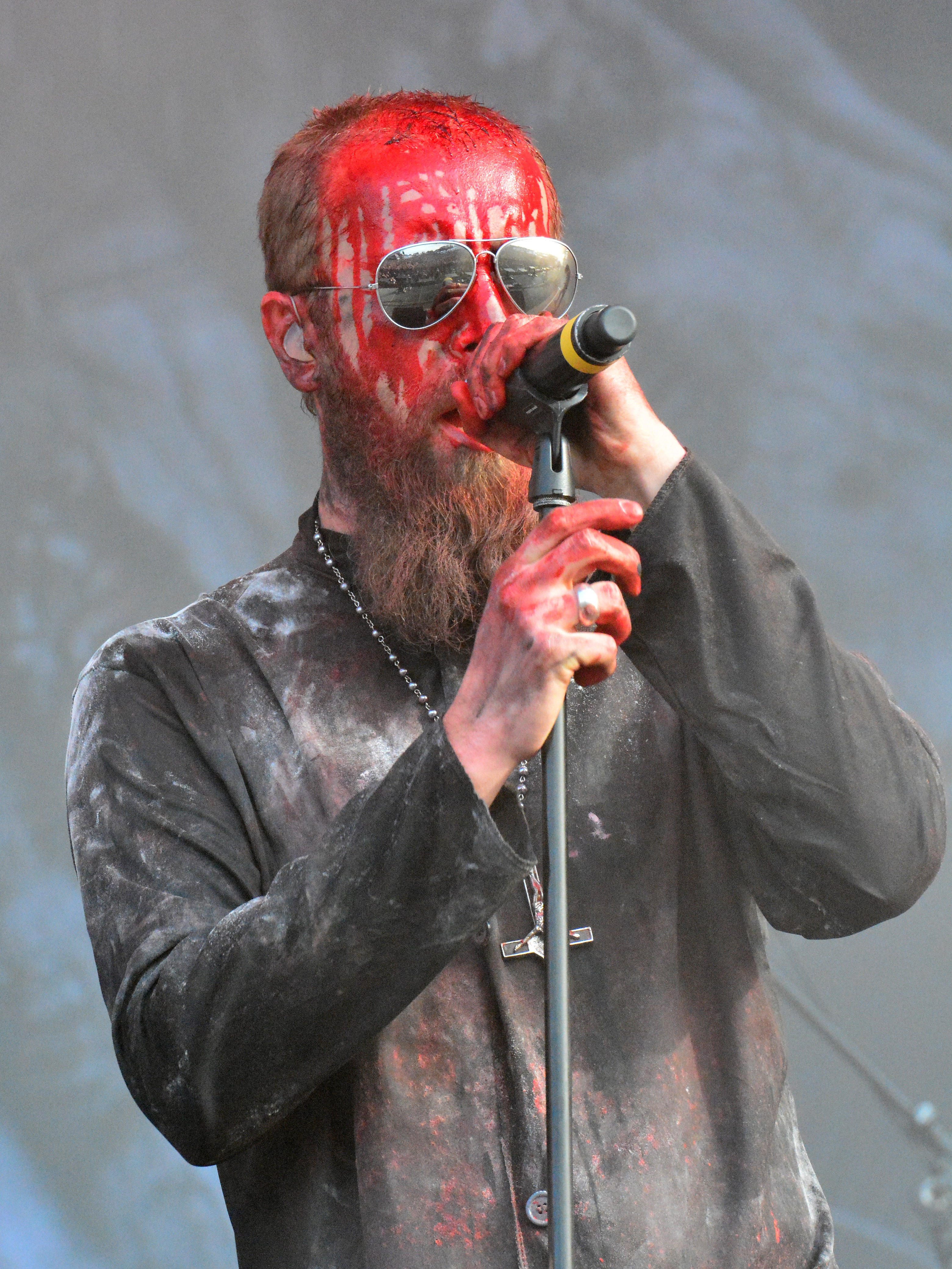 Bloodbath beim Wacken Open Air 2015